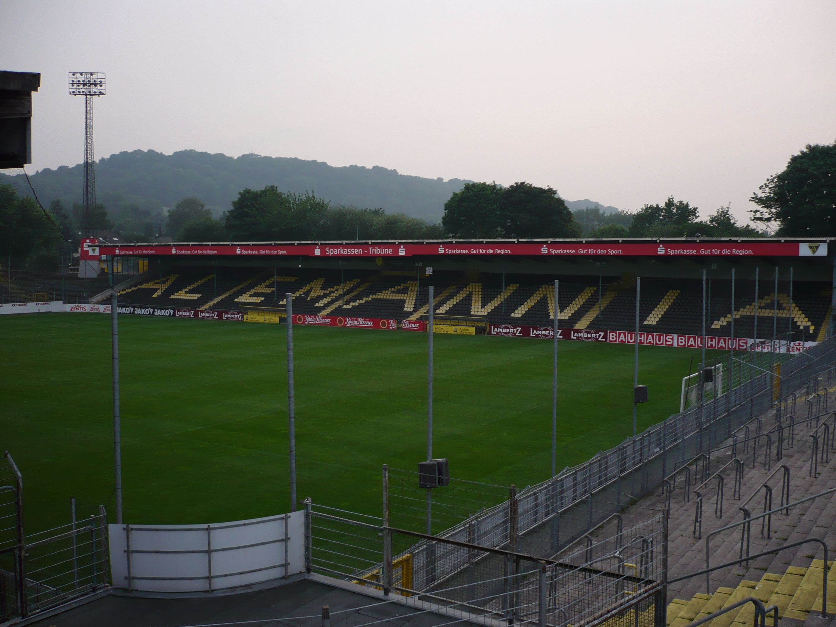 Tivoli, Haupttribüne. Im Hintergrund der Lousberg.